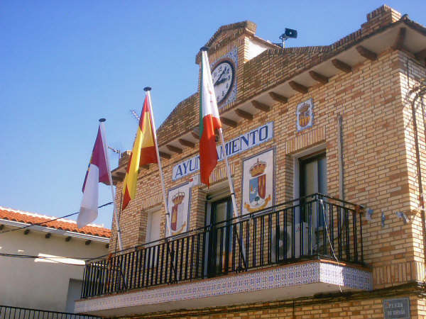 Ayuntamiento de Mesegar de Tajo (Toledo)